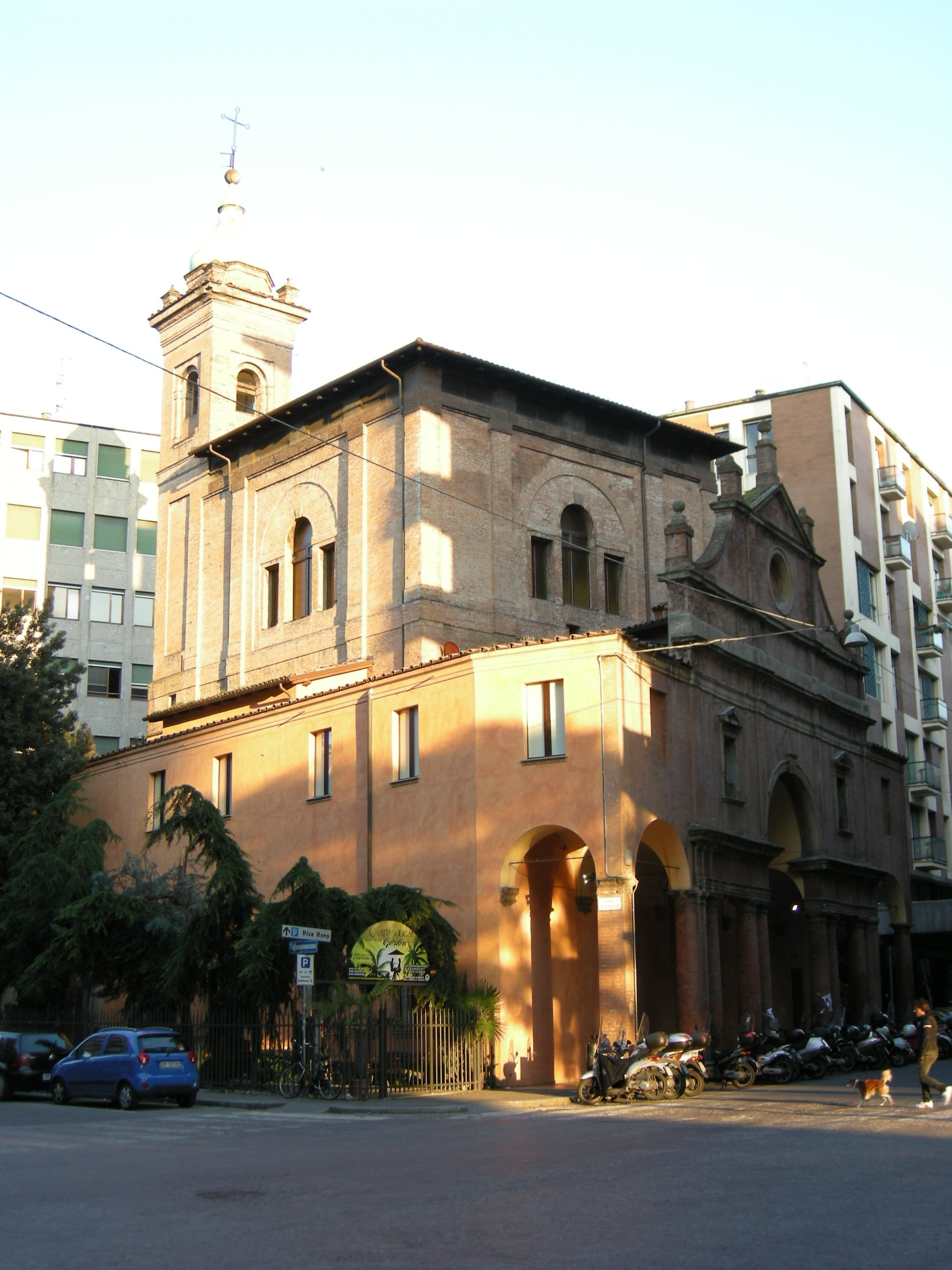 Ex Chiesa di Santa Maria del Buon Pastore, via Lame 83, Bologna